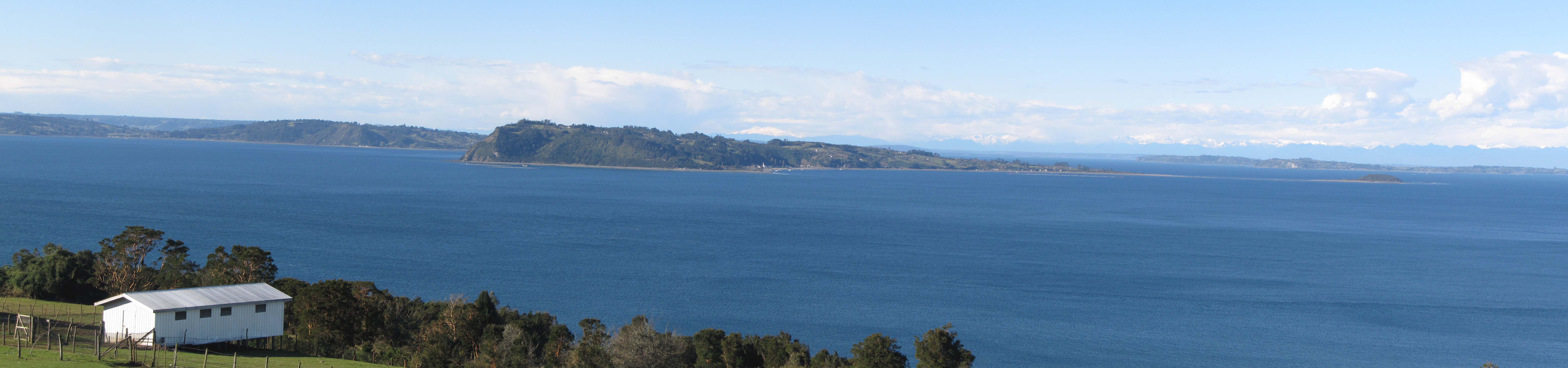 La isla Llingua y el islote Chequetén vistos desde el mirardor del Alto de la Paloma, Quinchao, Chile.